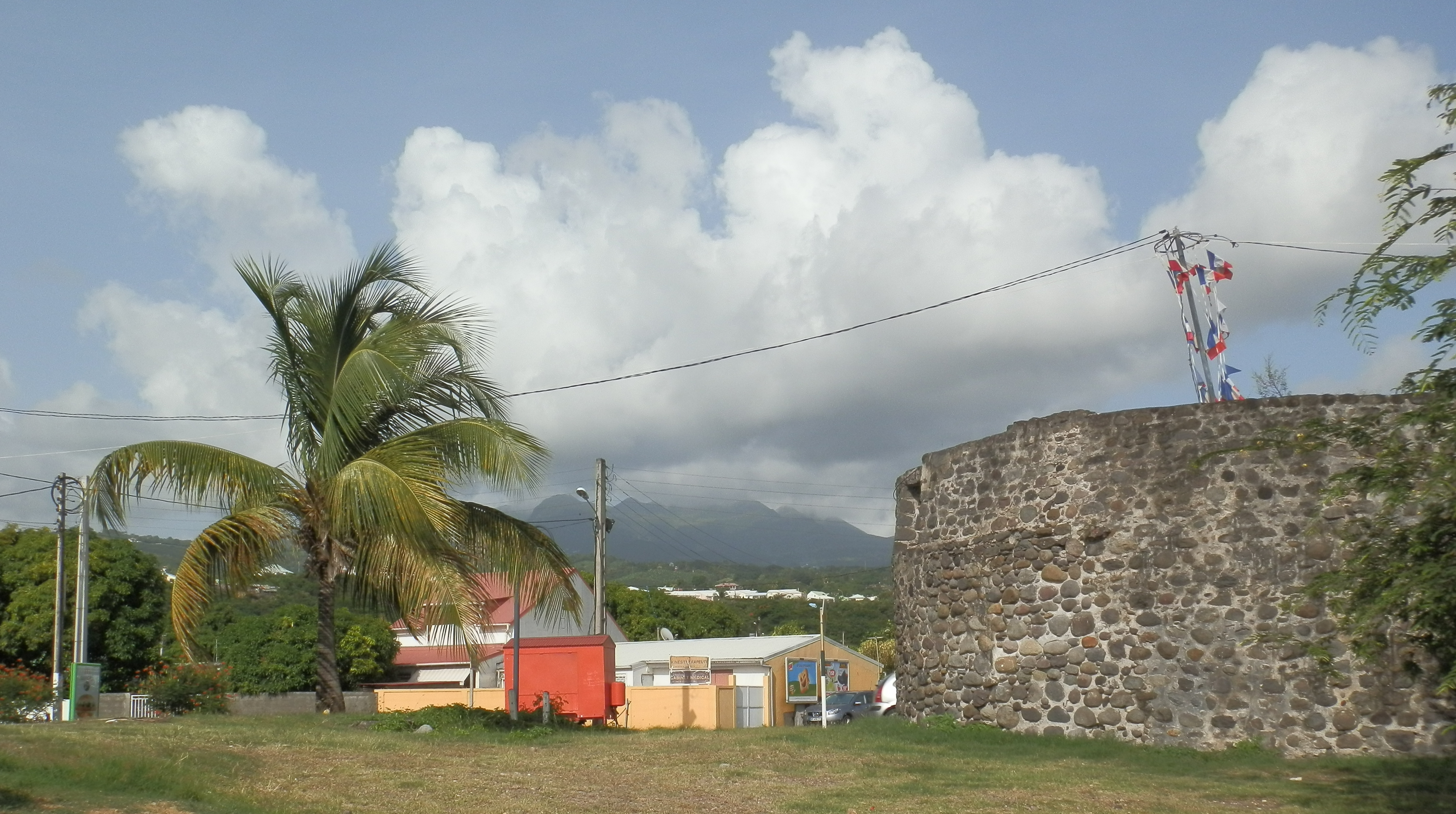 Tour du Père-Labat, (Inscrit, 1979) .